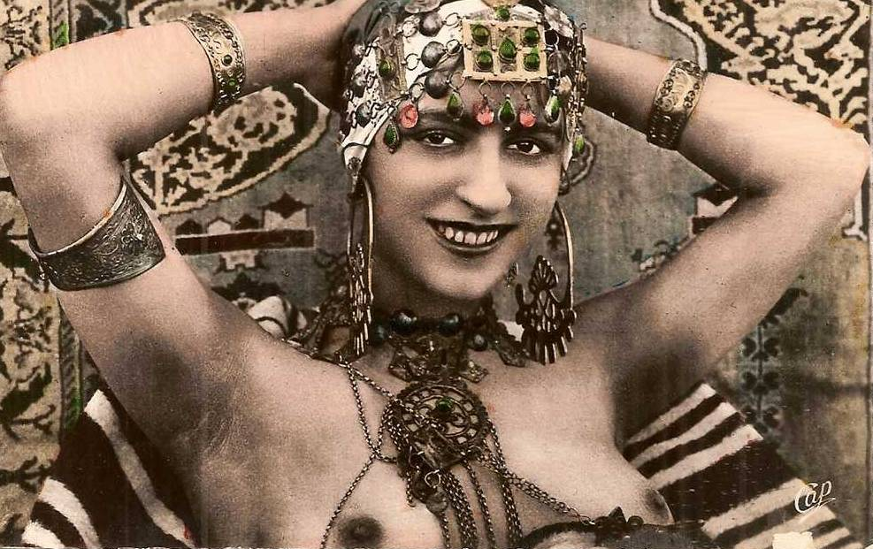 Compagnie des Arts Photomécaniques postcard